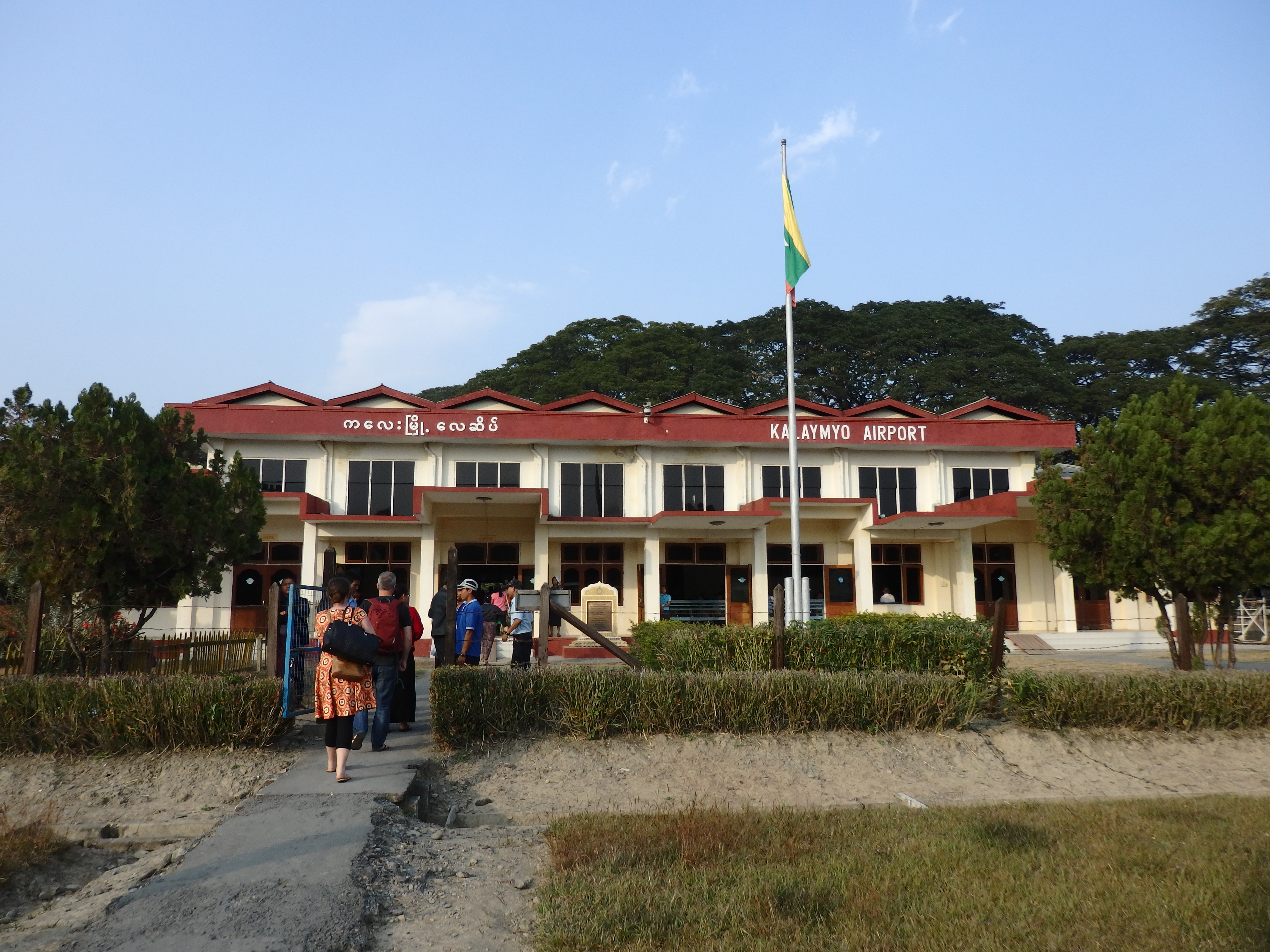 Kale, Myanmar (Burma)